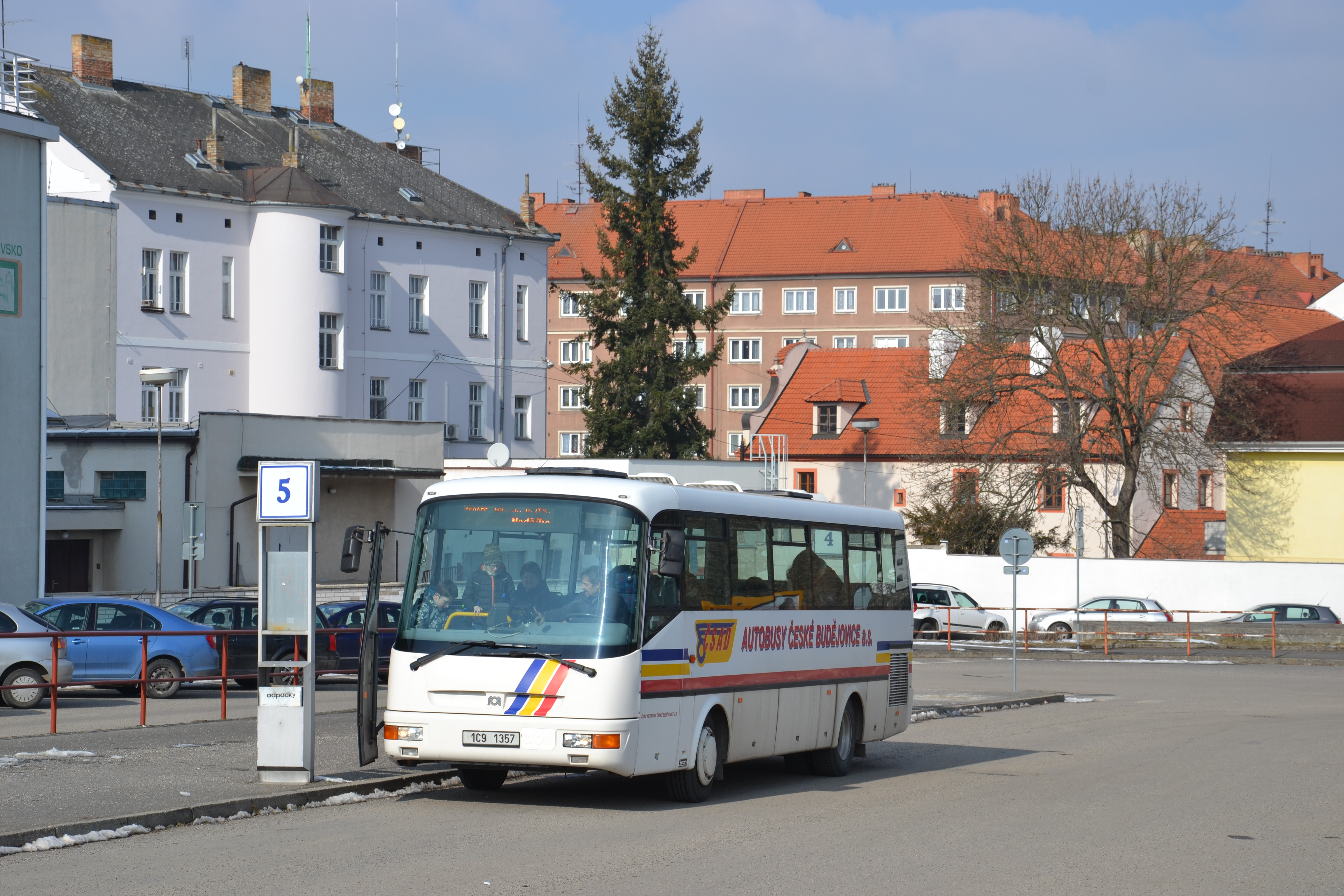 Vozový park milevské provozovny dopravce ČSAD AUTOBUSY ČESKÉ BUDĚJOVICE tvoří zejména vozy SOR jako na obrázku.